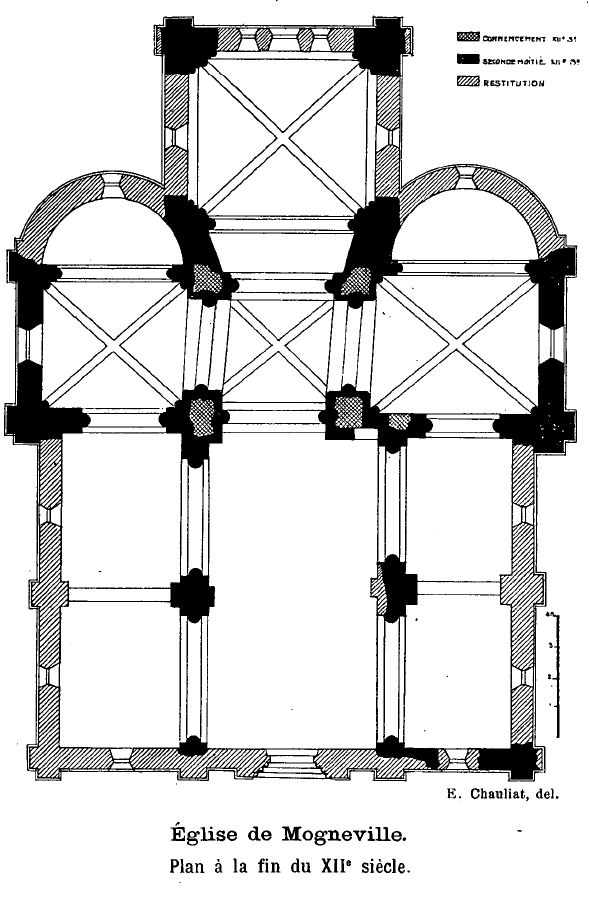 Plan des masses de l'église à la fin du XIIe siècle.